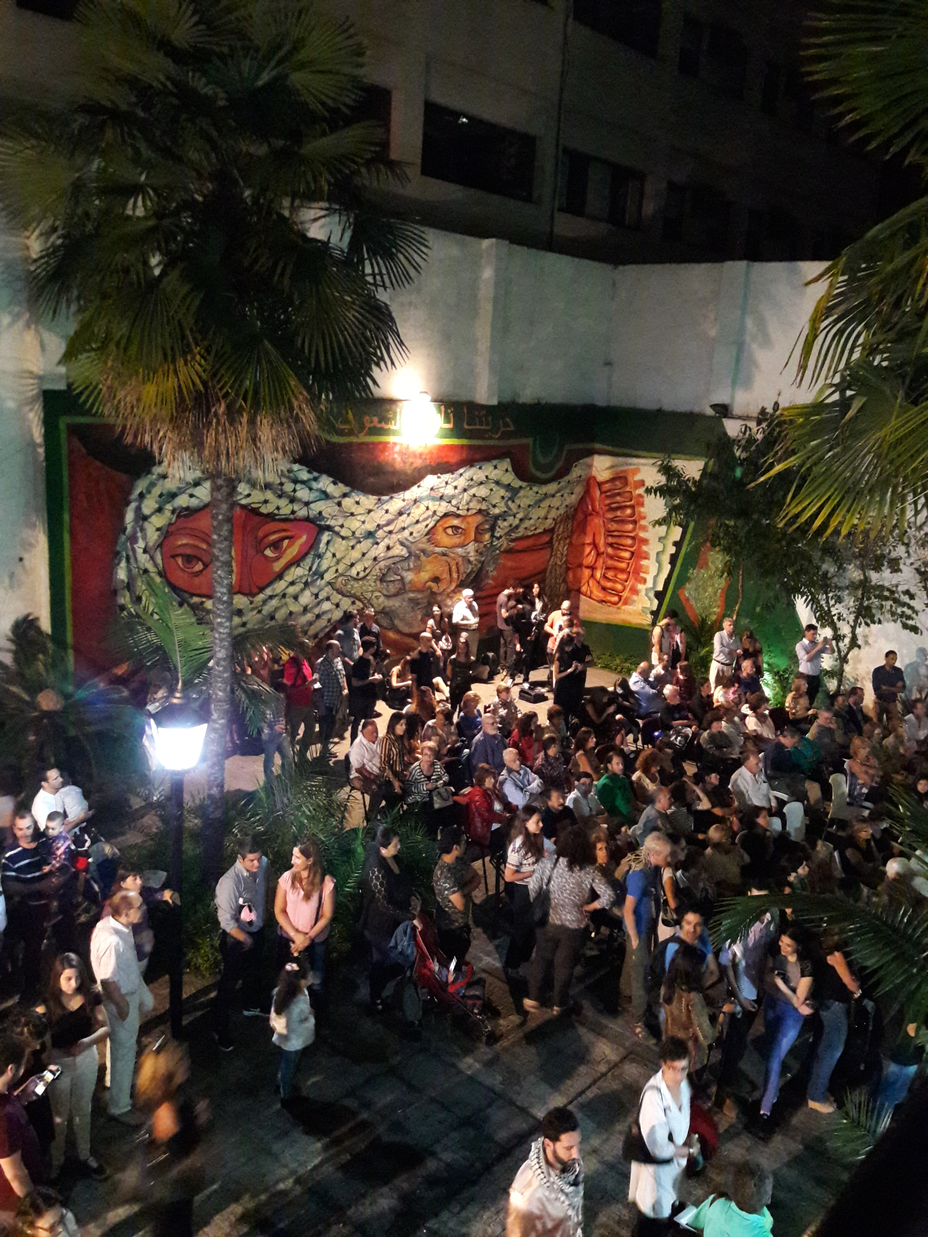 El sábado 1 de abril de 2017, la Embajada de Palestina en Buenos Aires realizó una celebración por el día de la Tierra Palestina, pariticipando la colectividad palestina y demás argentinos interesados.